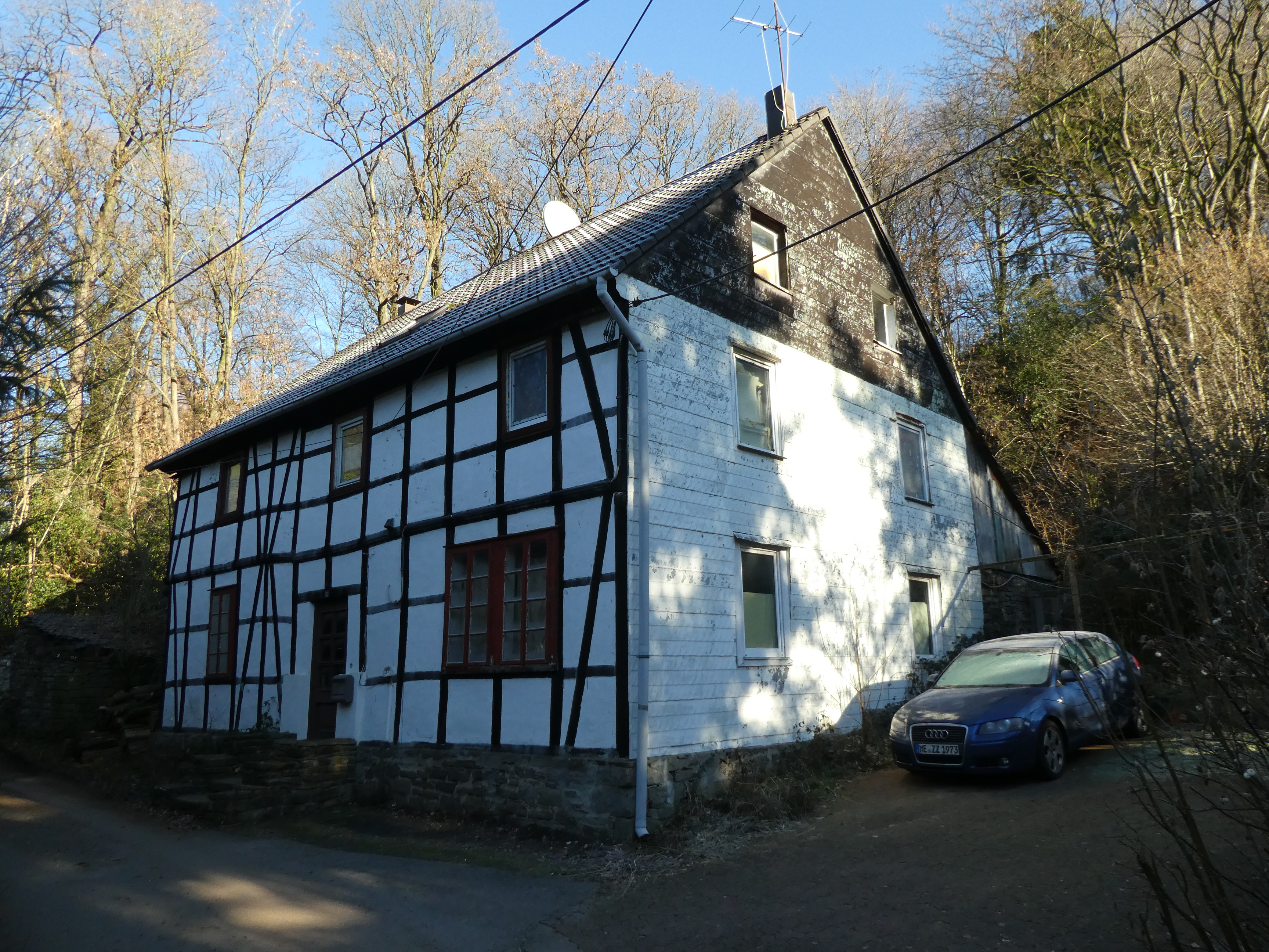 Großhefel Velbert Hefel Fachwerkhaus Hespertal